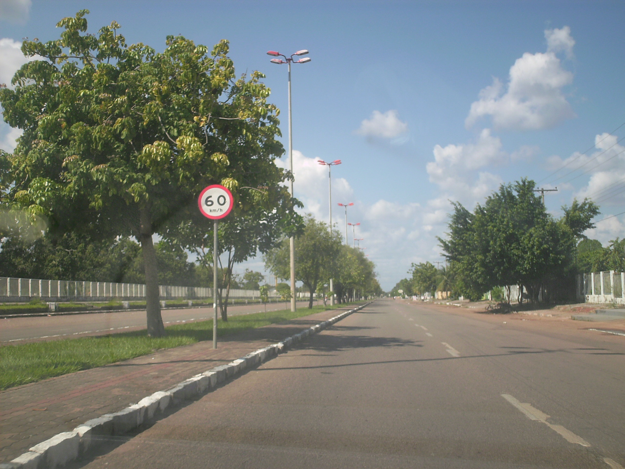 Avenida Brigadeiro Eduardo Gomes, Boa Vista, Brasil